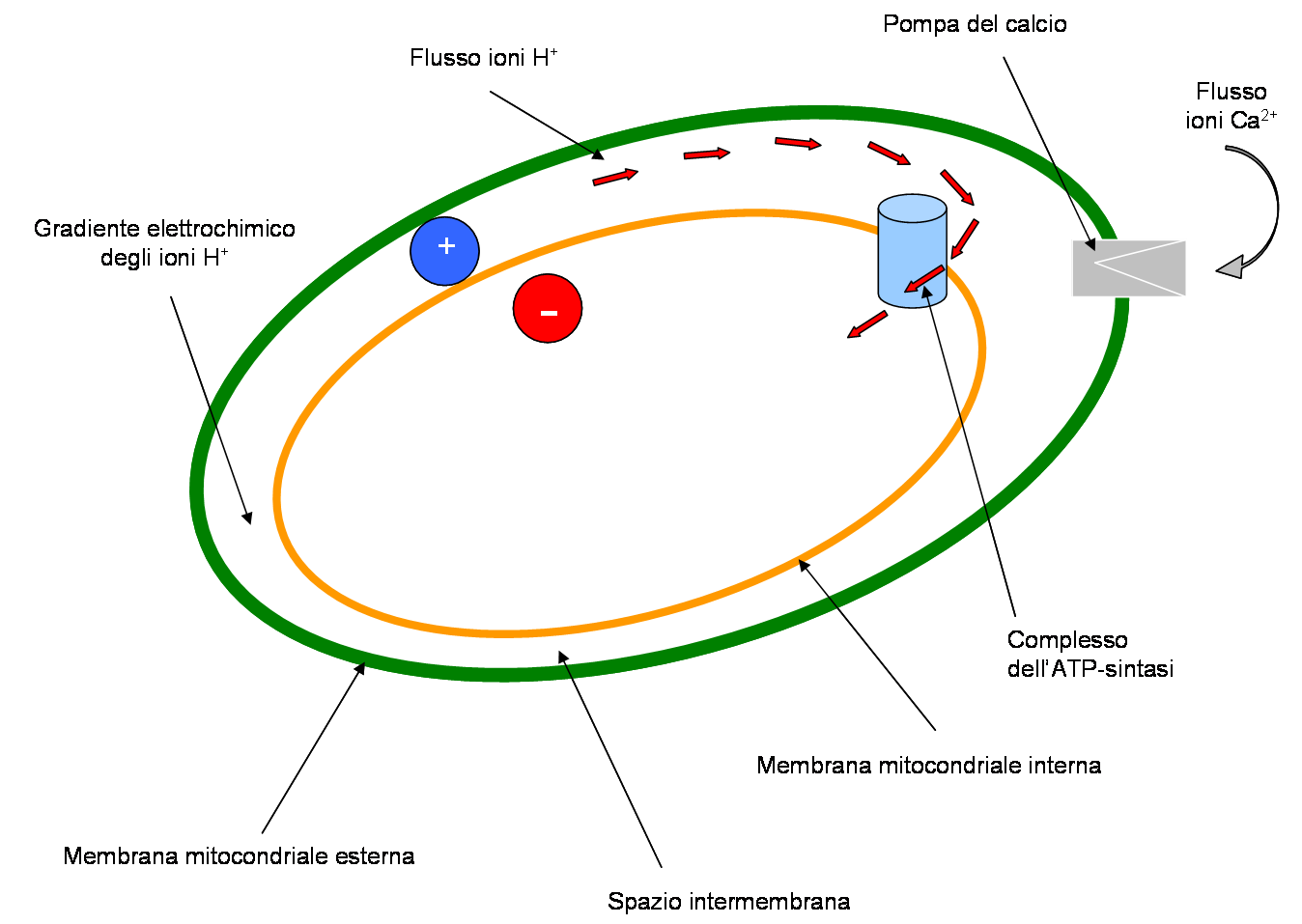 Schema degli eventi mitocondriali che portano alla formazione della molecola di ATP